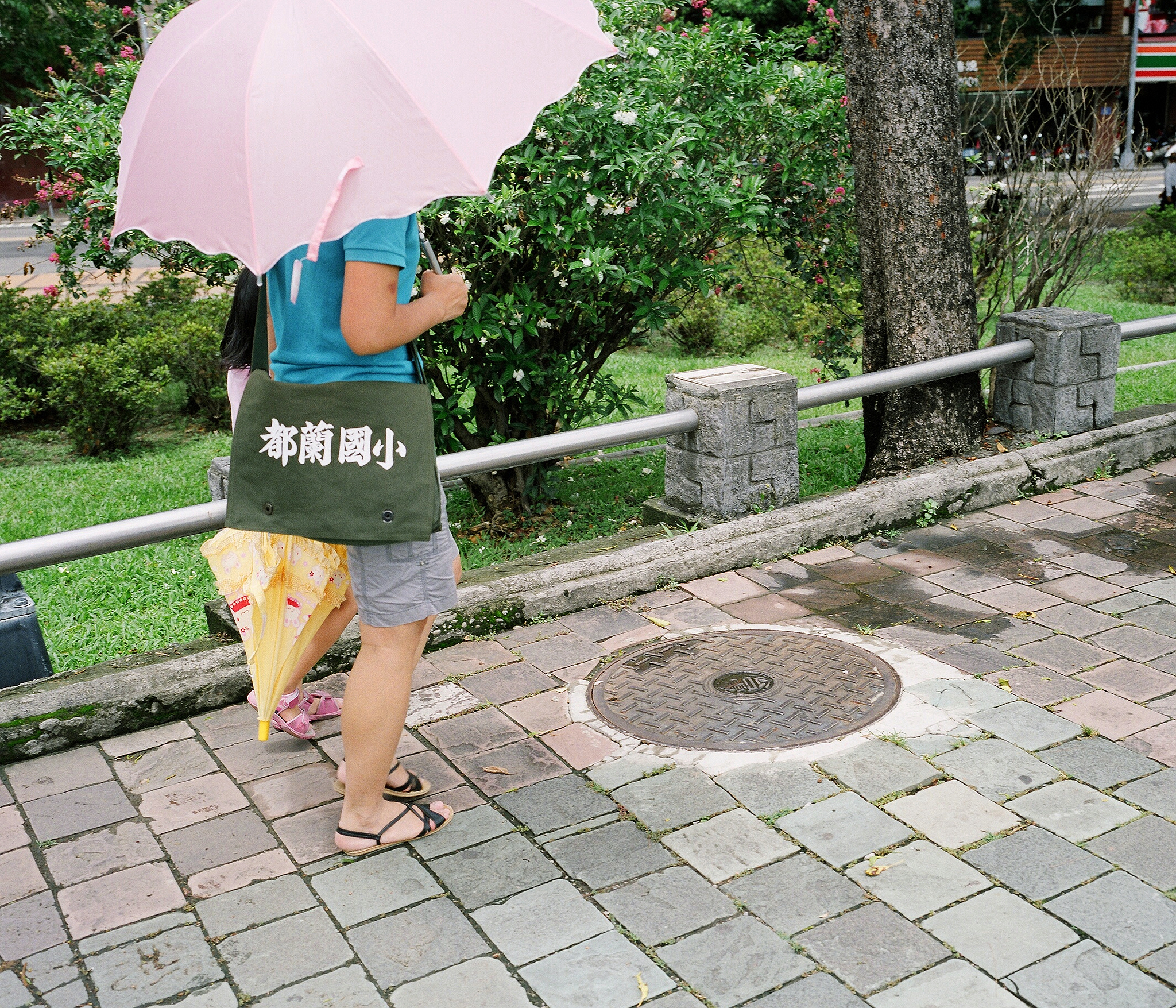 中文（台灣）: 臺中公園，臺東縣東河鄉都蘭國民小學書包與台灣電力公司圓形人孔蓋。